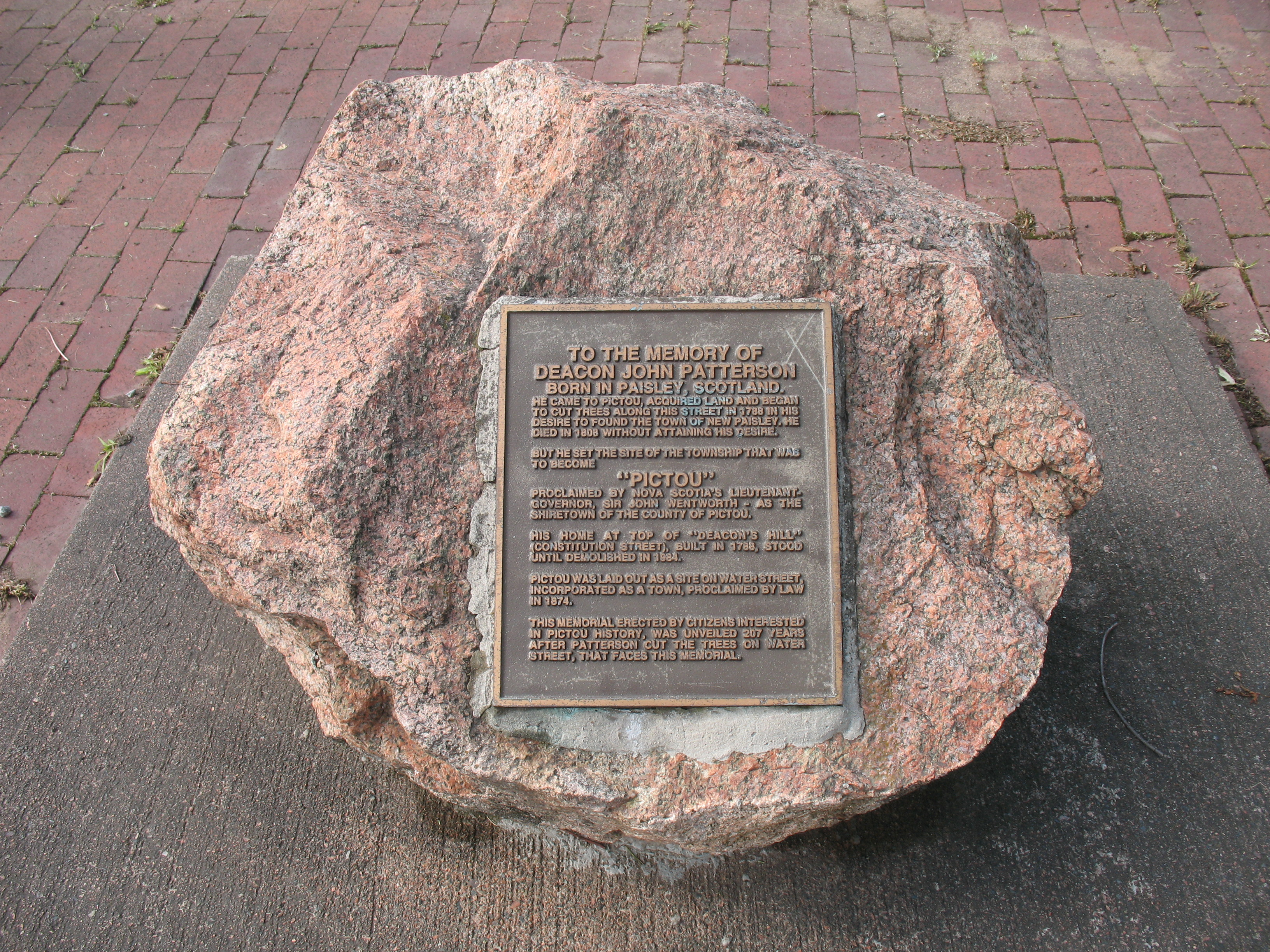 Gedenktafel zur Erinnerung an John Patterson in Pictou, Neuschottland